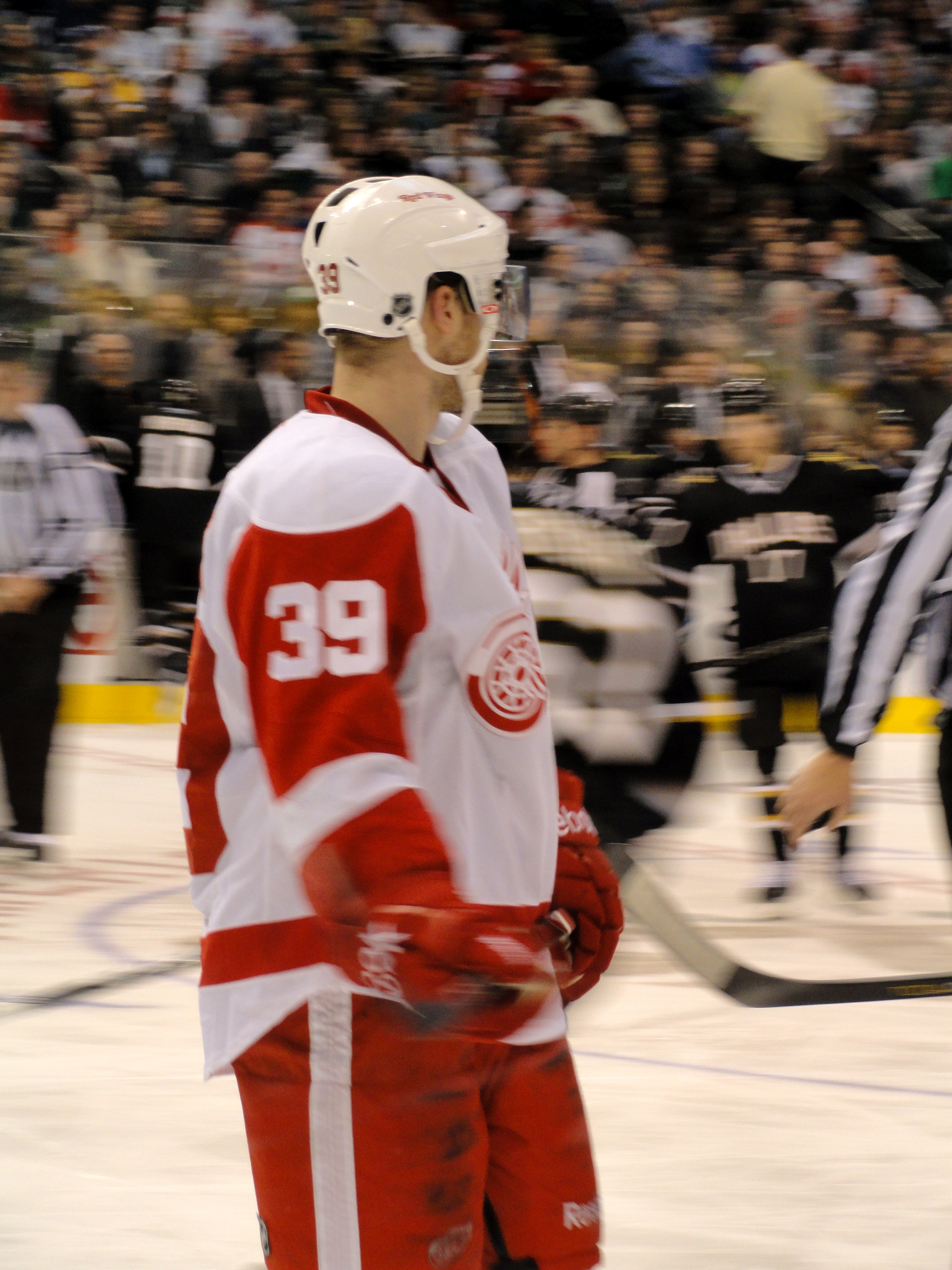 Jan Mursak